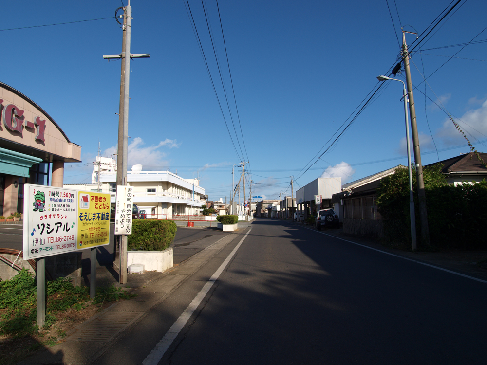 伊仙町役場